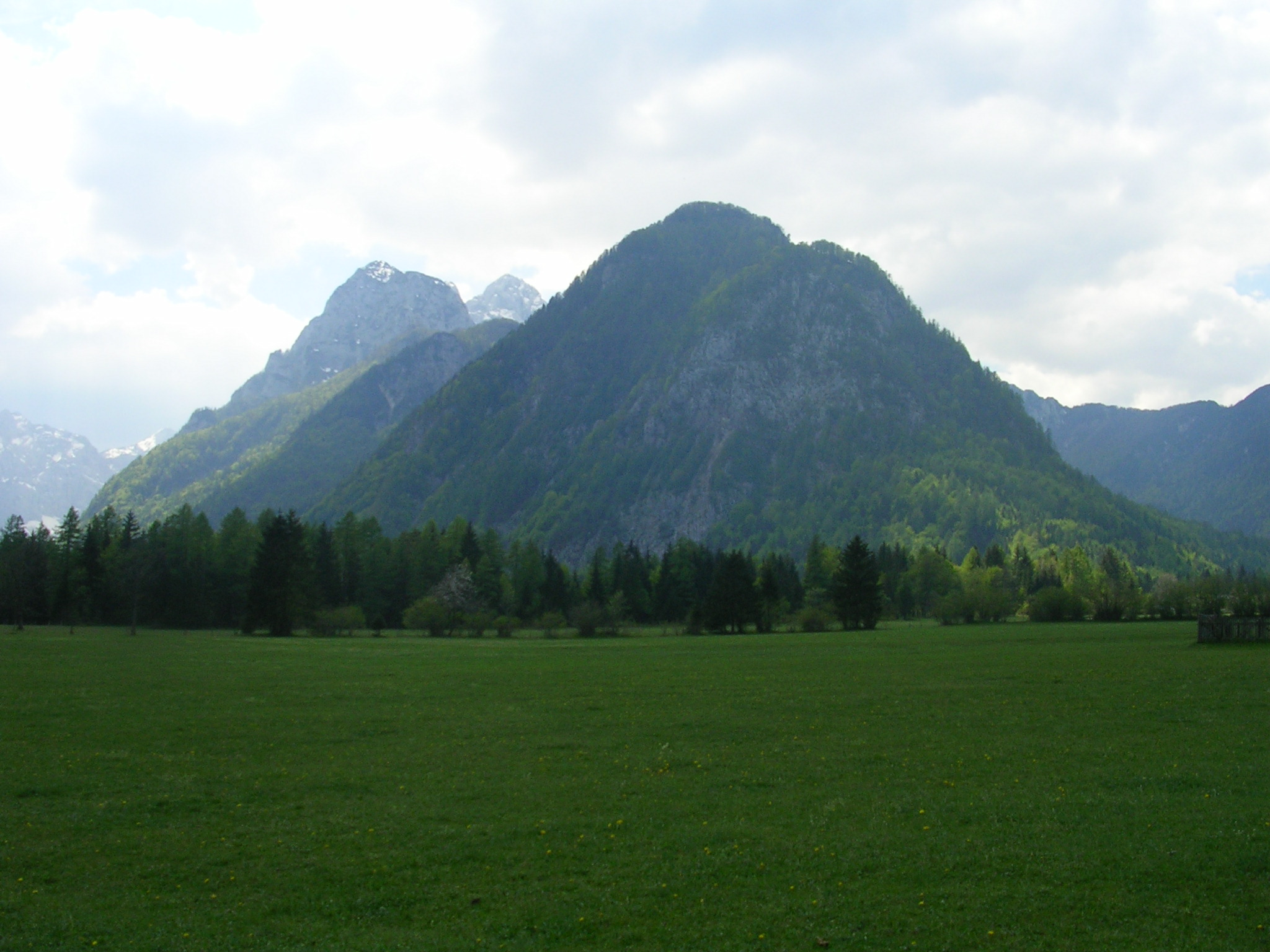 Upper Radovna